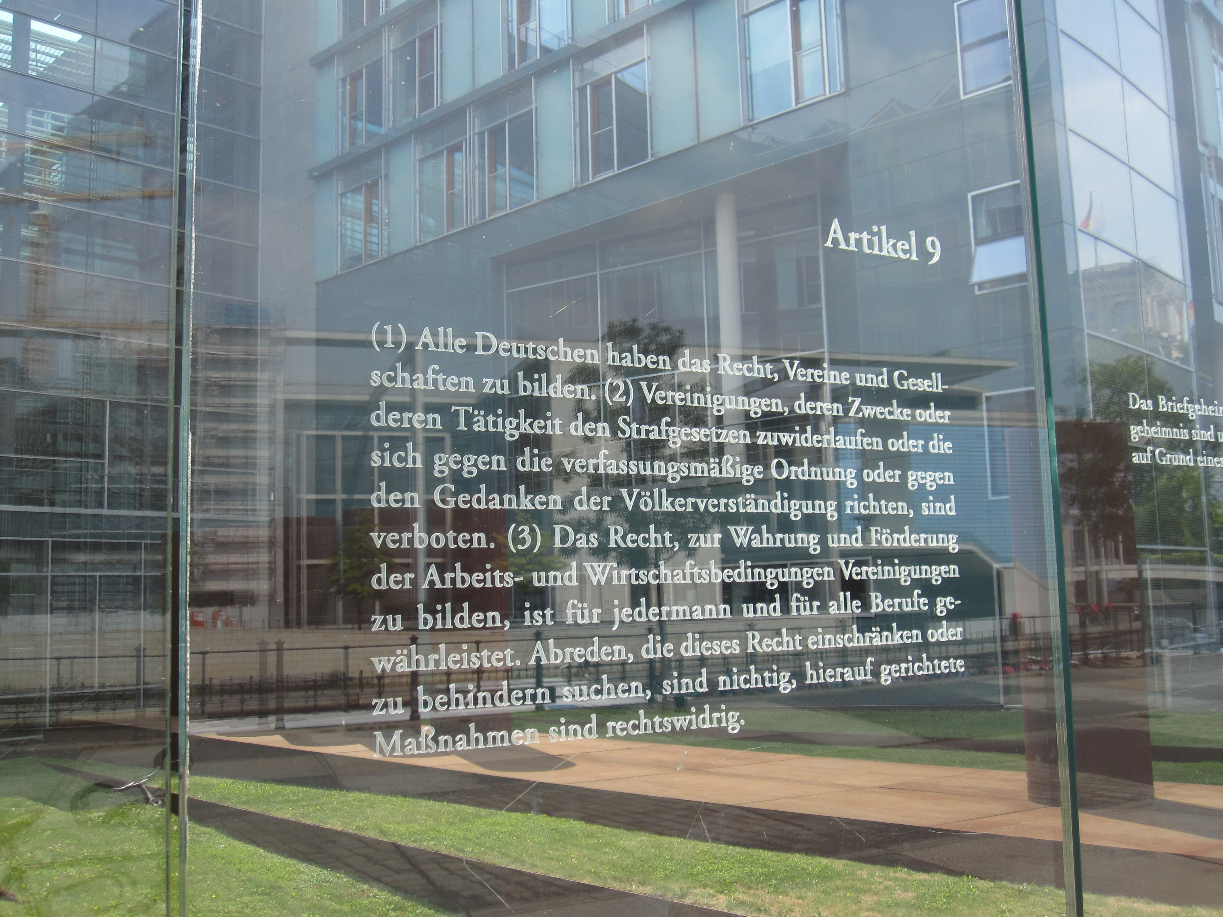 Bundestagsgebäude in Berlin: Der israelische Künstler Dani Karavan hat in drei Meter hohe Glasscheiben, die einen Außenhof des Jakob-Kaiser-Hauses im Uferbereich zur Spree begrenzen, die 19 Grundrechtsartikel des Grundgesetzes mit Laser eingraviert. „Die Grundrechtsartikel schweben gleichsam in Augenhöhe vor dem Haus der Fraktionen, dem Jakob-Kaiser-Haus“ (Andreas Kaernbach, Deutscher Bundestag).